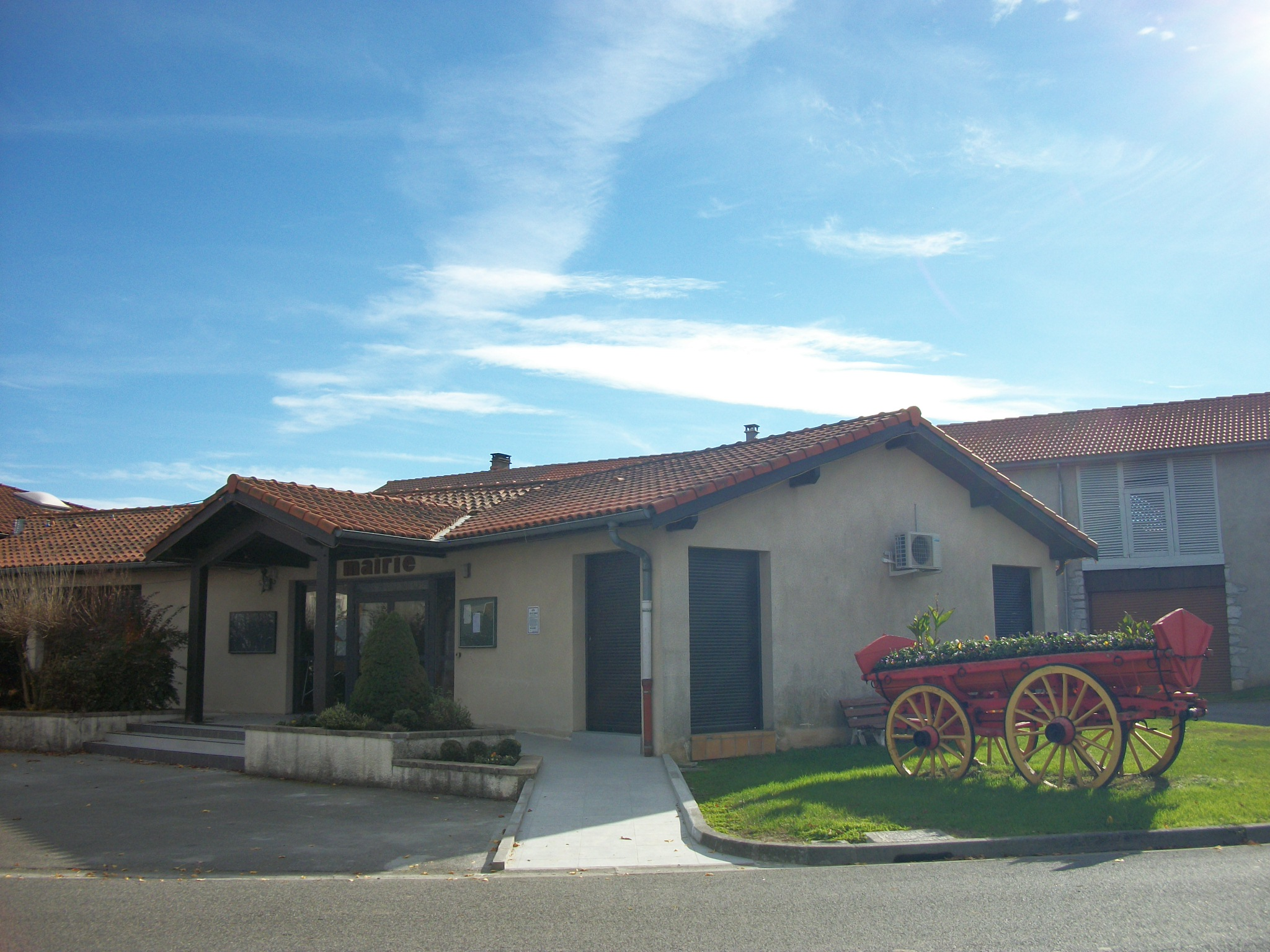 Mairie d'Ausson